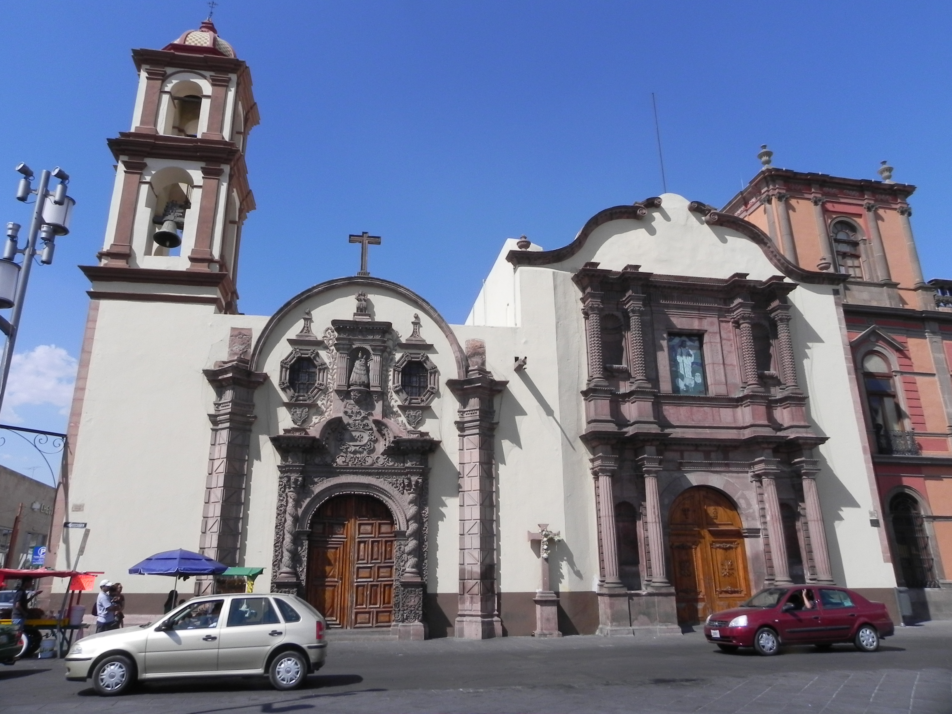 Templo la Compañía de Jesús y Capilla de Nuestra Señora de Loreto